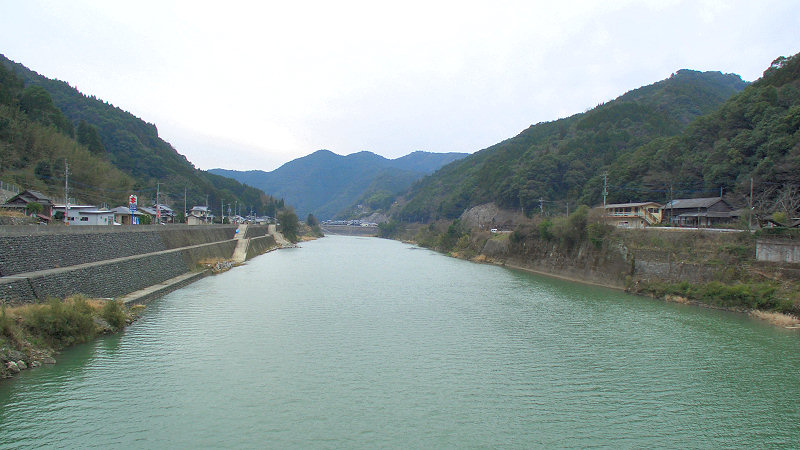 JR肥薩線白石駅 駅周辺 駅北側の神瀬橋から球磨川上流方向を見る。 右手前の木造の建物が白石駅、左側の右岸には国道219号が走る。 撮影者/著者/著作権保有者 : MK Products (本人がアップロード) 撮影日 : 2007/02/04 白石駅_用にアップロードした画像です。良い画像があれば別の画像に変えてください。